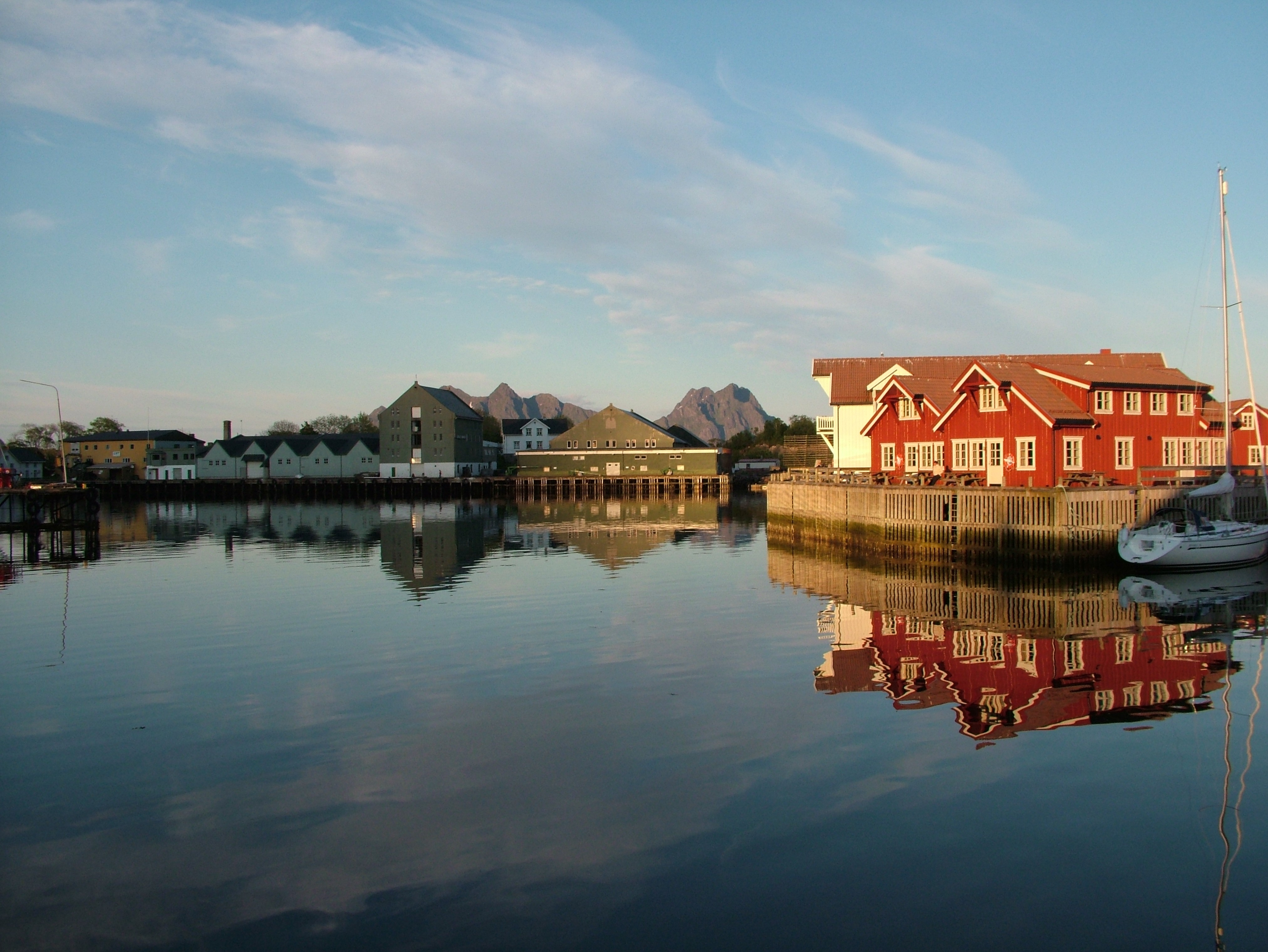 Der Hafen am Abend, Svolvær, Lofoten, Norwegen.